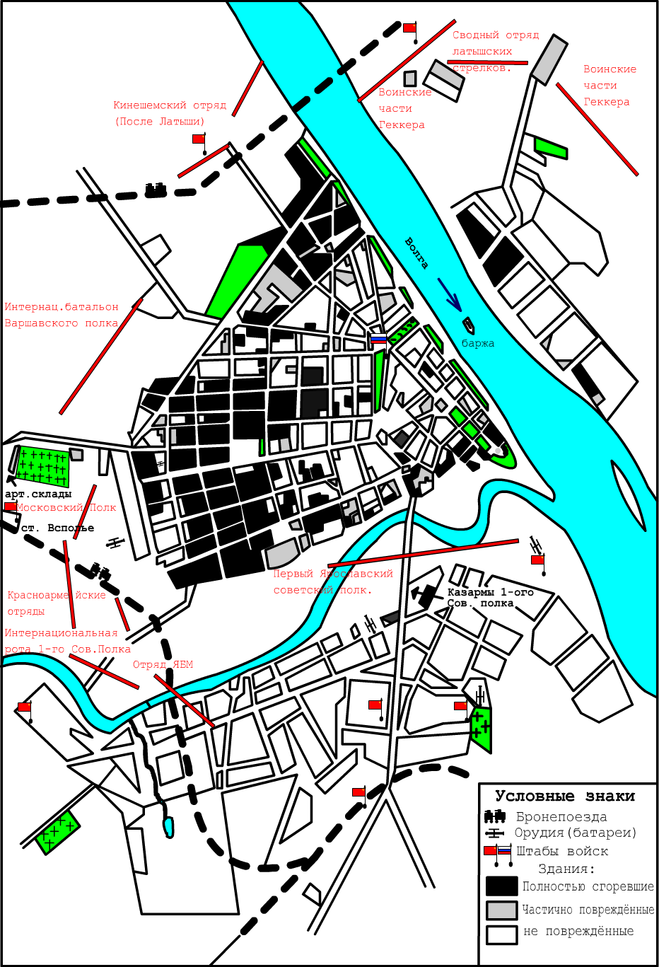 Карта Белогвардейского восстания 1918 года в Ярославле; Отмечены повреждённые кварталы, расположение войсковых частей, батарей, баржа смерти. Оцифрованная версия карты хранящейся в Ярославской Областной Некрасовской Библиотеке